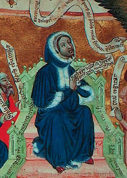 "Detall del recto del primer foli del Terç de Lo Crestià" (obra de Francesc Eiximenis, nascut a Girona, entre 1328 i 1332 i mort a Perpinyà el 1409).